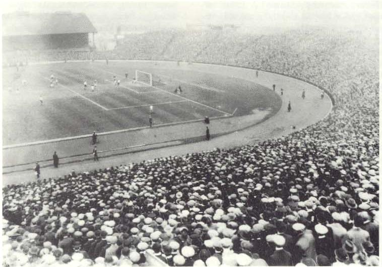 Chelseas Stamford Bridge ca. 1914